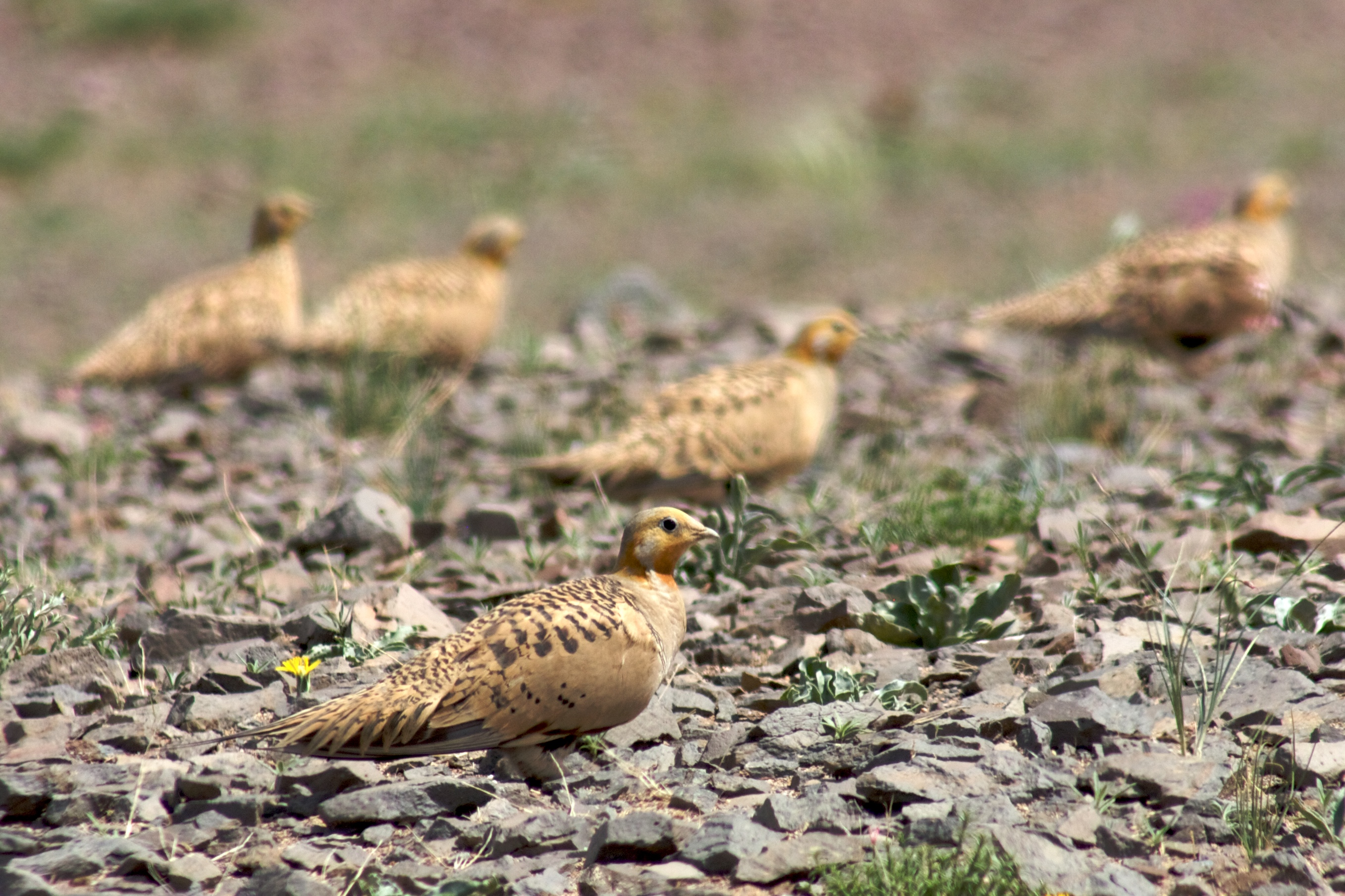 Groupe de Syrrhaptes paradoxal, désert de Gobi - Mongolie